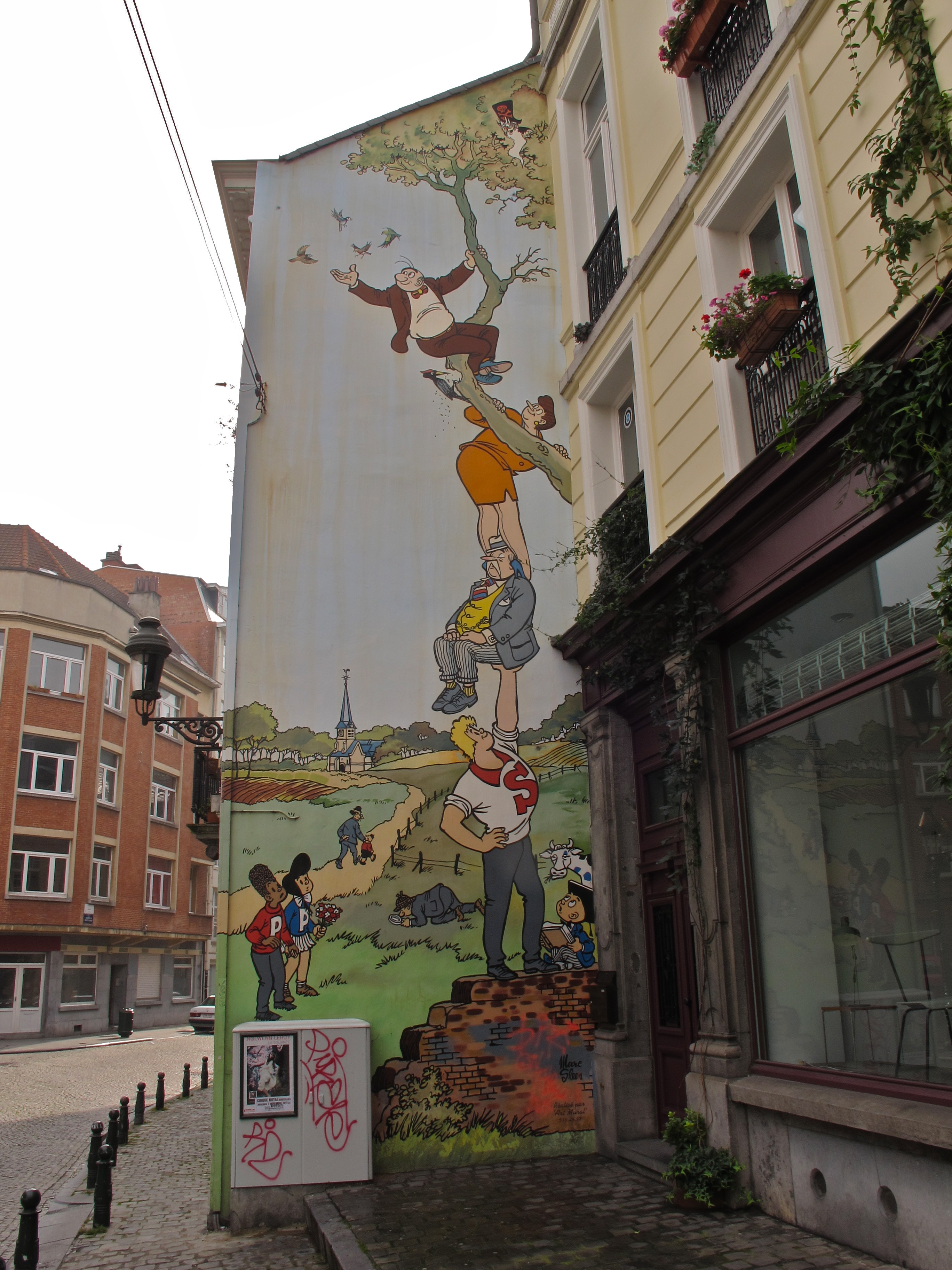 Stripmuur Nero te Brussel